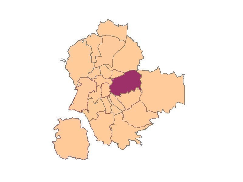 plan de saint-etienne Quartier de Monthieu Saint-François